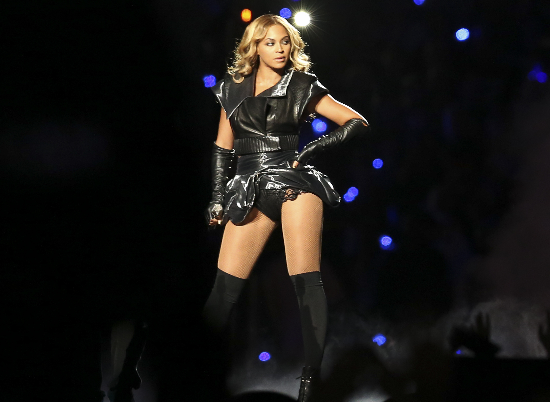 DW2Q0596